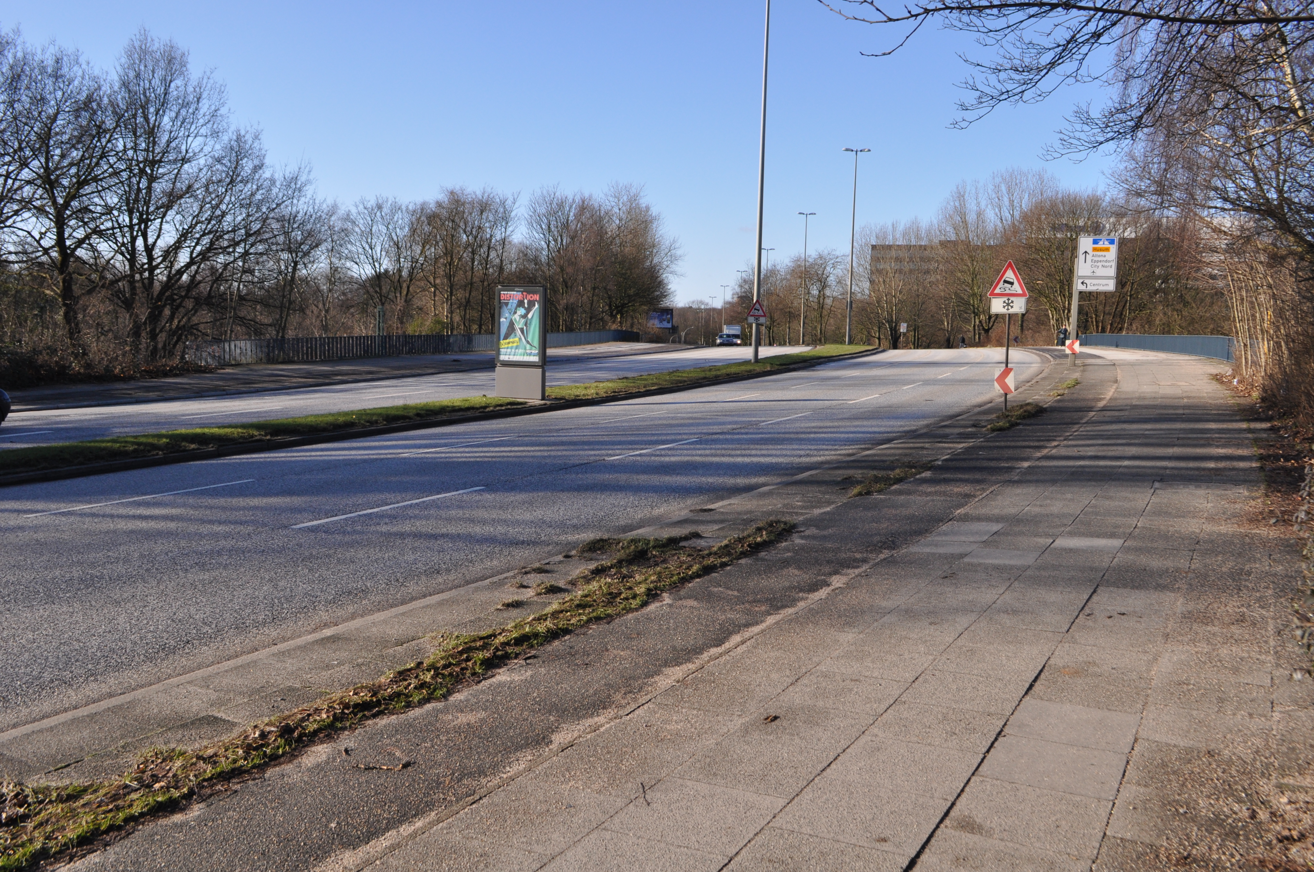 Jahnbrücke in Hamburg-Barmbek-Nord, vom Rübenkamp gesehen.